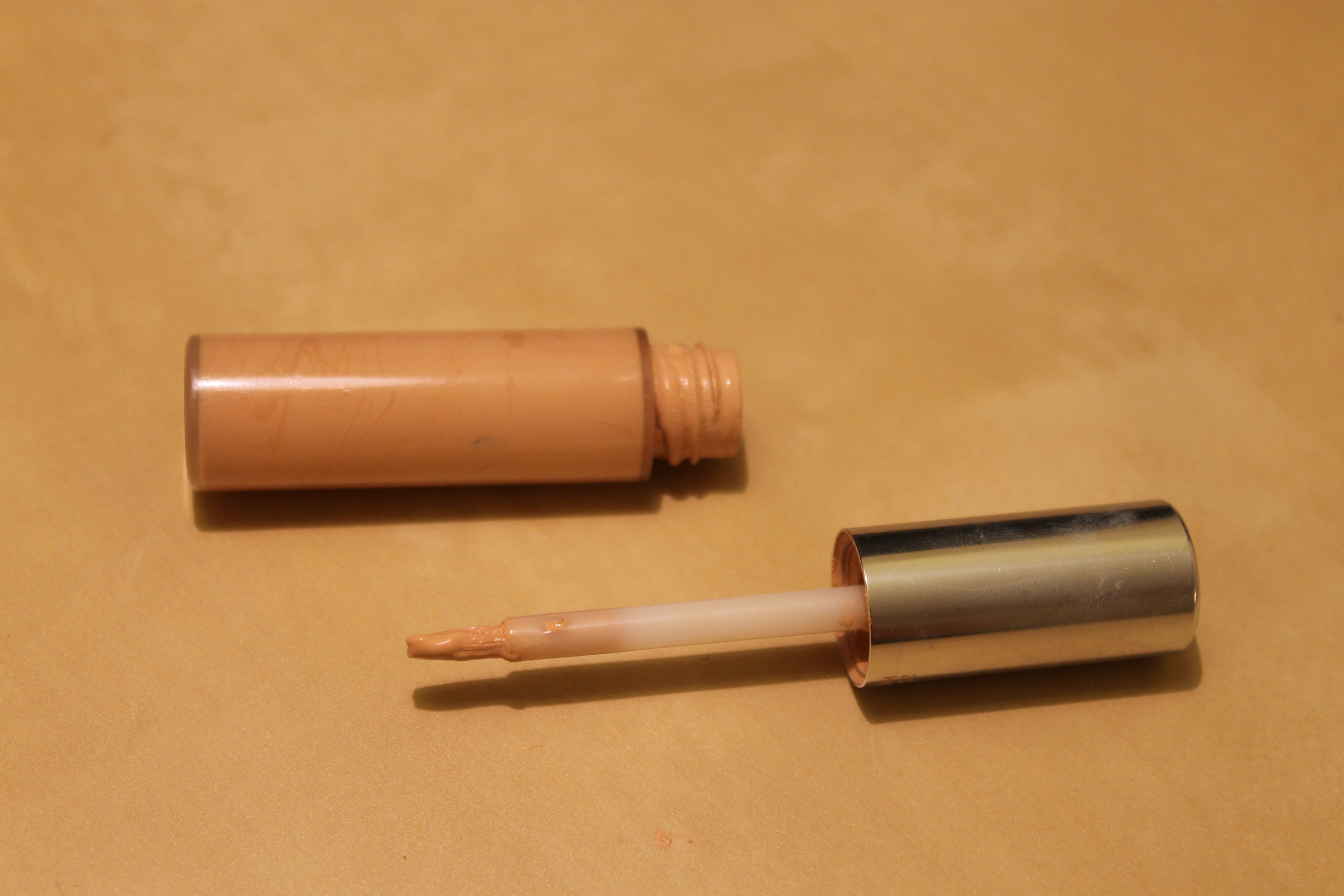 Concealer